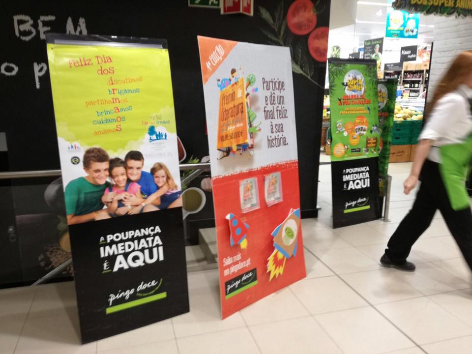 Cartazes num supermercado